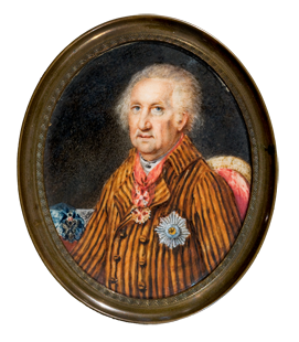 Портрет М. Ф. Соймонова Начало 1800-х Кость, акварель, гуашь. 7,1 × 5,7 (овал) Михаил Фёдорович Соймонов (15 мая 1730, Москва — 17 октября 1804, Москва) — сын действительного тайного советника, вице-адмирала, сенатора, известного гидрографа и картографа Ф. И. Соймонова (1692 – 1780), сосланного в Сибирь по делу А. П. Волынского. С 8 лет отдан учиться в Академию наук, в 1742 записан бомбардиром в артиллерию и отдан в Артиллерийскую школу. В 1753 был отправлен в Сибирь для описания в Нерчинском уезде хлебопахотных земель и измерения фарватера реки Шилки. После пожалован в поручики и снова послан в Сибирь для описания китайской границы и укрепления Нерчинска. С 1763 – обер-прокурор 3-го департамента Сената с производством в генералмайоры. С 1771 – директор Берг-коллегии и монетных дворов. В 1773 по его инициативе была учреждена Горная школа (впоследствии Горный институт). С 1796 – тайный советник и сенатор. В 1801 из-за болезни был уволен со службы. Изображен в отставке, в домашнем костюме, с орденами Св. Андрея Первозванного (пожалован в 1799), Св. Александра Невского и Св. Анны. Авторство Ф. Кюнеля было предложено Л. Ю. Рудневой на основе стилистической близости данной миниатюры к его известным работам. Происхождение: собрание великого князя Николая Михайловича (1859–1919); частное собрание, Барселона; аукцион Christie’s «Выдающиеся портретные миниатюры и золотые табакерки», Лондон, 27 ноября 2007, лот № 146. Литература: Русские портреты XVIII и XIX столетий. Издание Великого князя Николая Михайловича. СПб., 1906, т. 2, илл. 189.